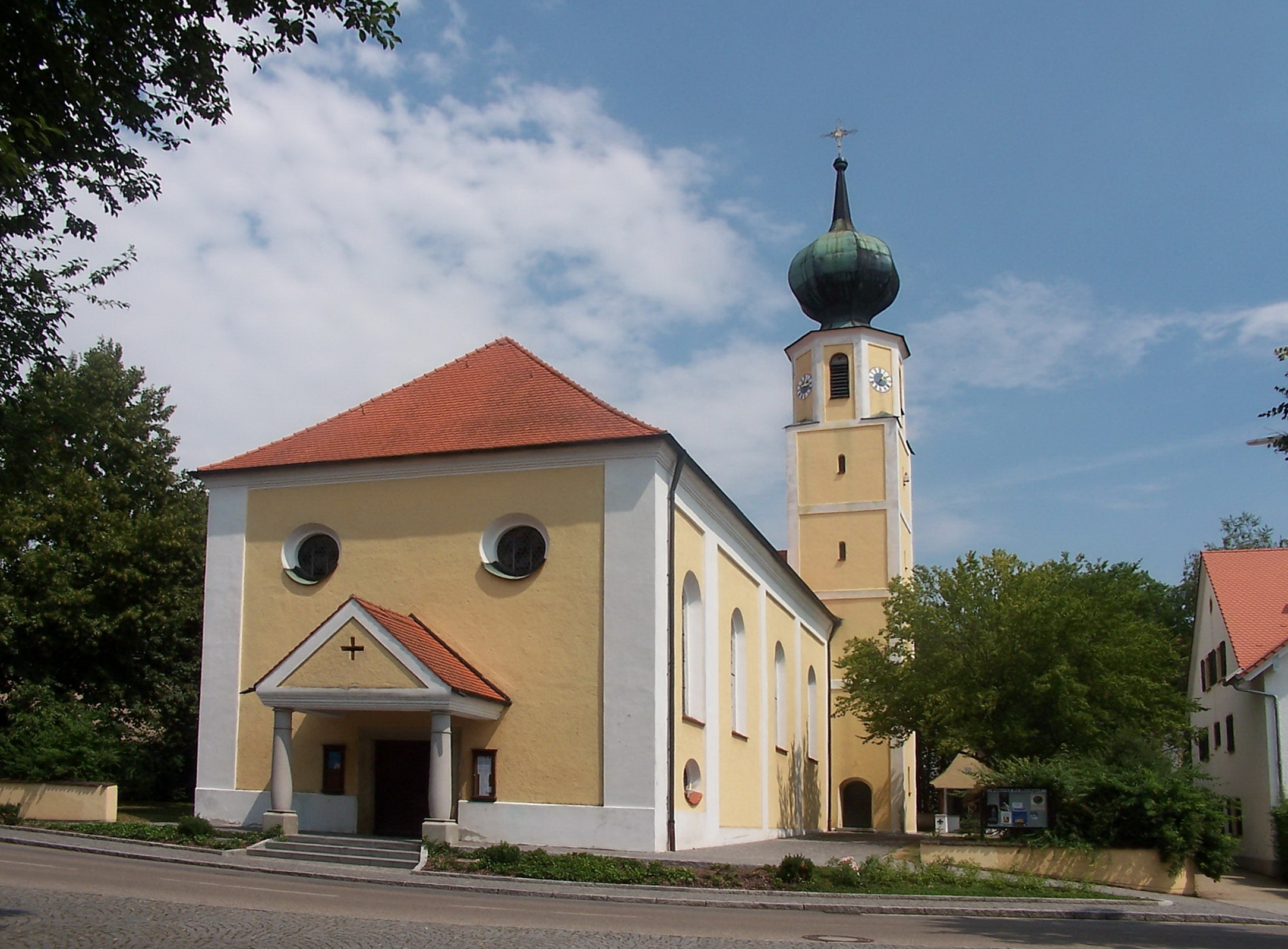 Köfering. Kirchstraße 5a. Kath. Pfarrkirche St. Michael, Saalbau mit eingezogenem Chor, Walmdach, Flankenturm mit Zwiebelhaube und Pilastergliederung, spätbarock, 1717 von Hans Caspar Öttl, Westturm 1618 von Hans Schön; mit Ausstattung.